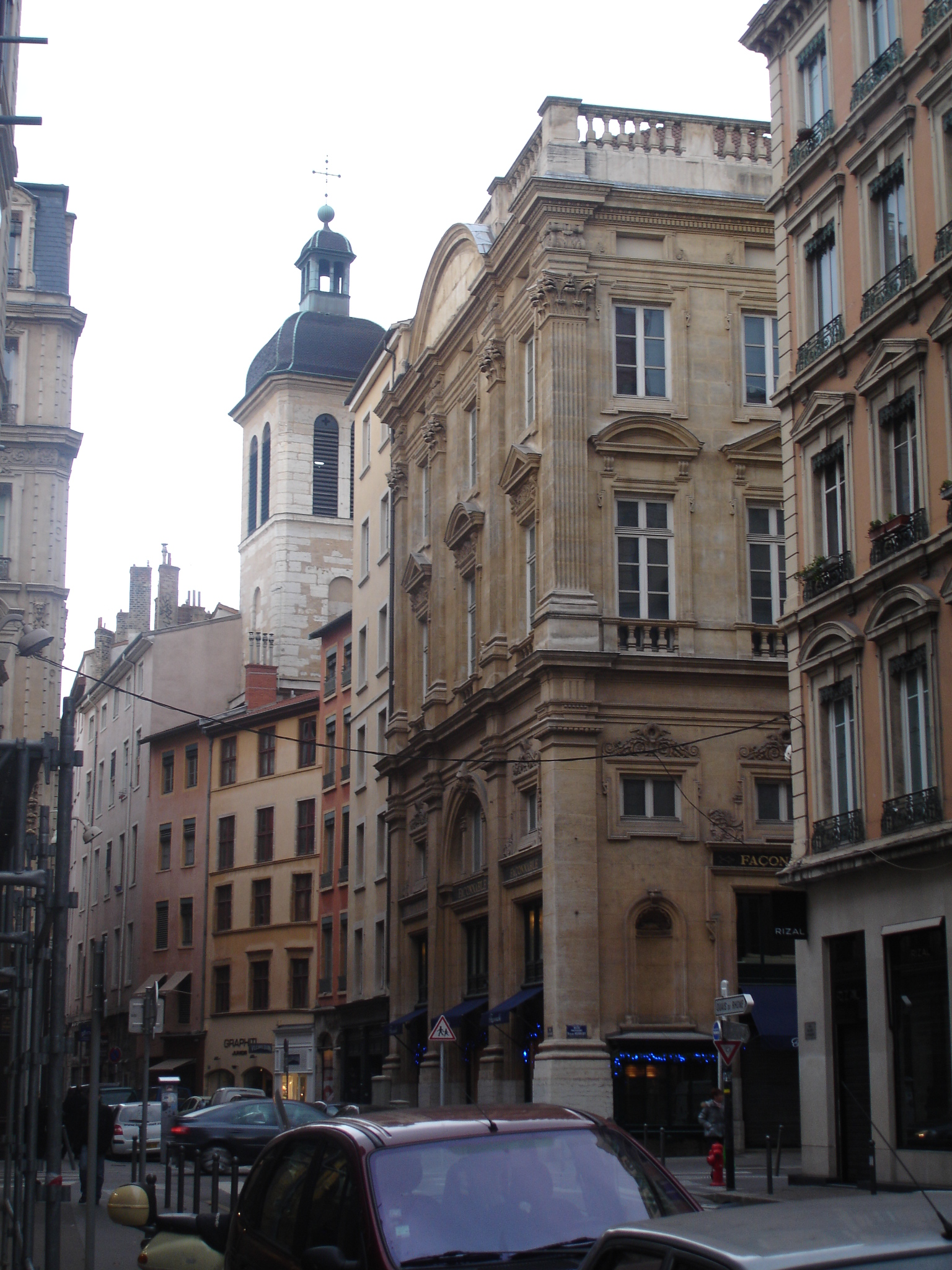 Lyon, rue du bât d'argent : partie la plus ancienne